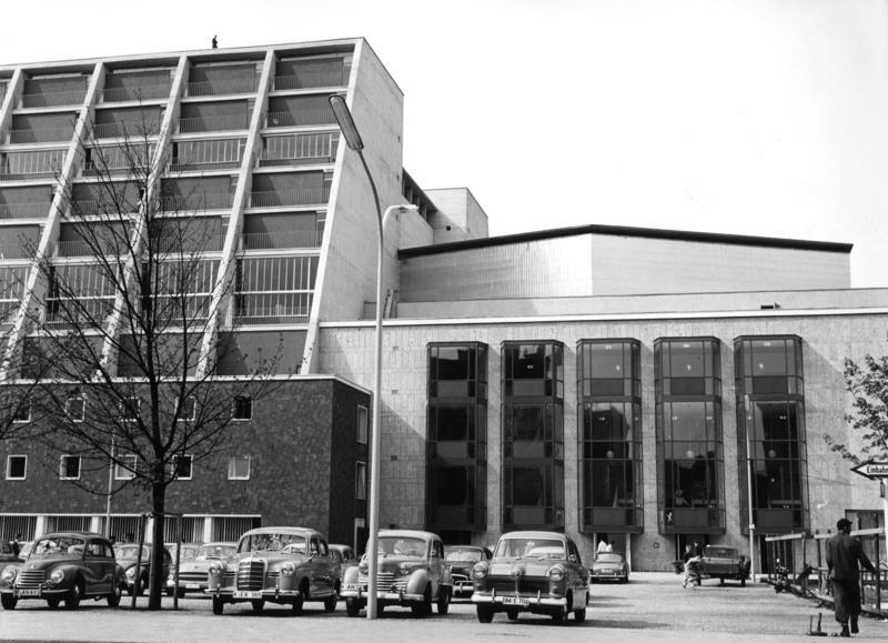 Köln Neues Opernhaus